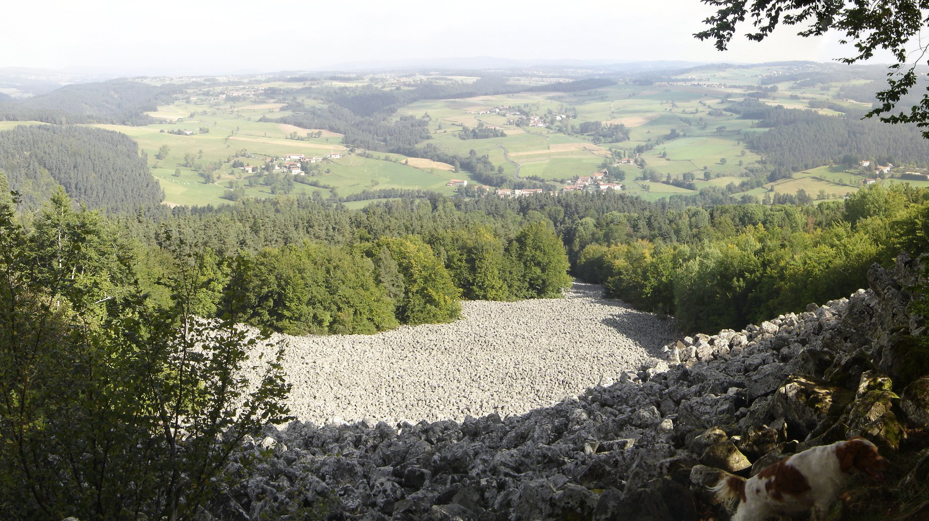 Vue supérieure de la coulée de lave de la Bourianne, située sur la commune de Saint-Julien-d'Ance (FR-43)